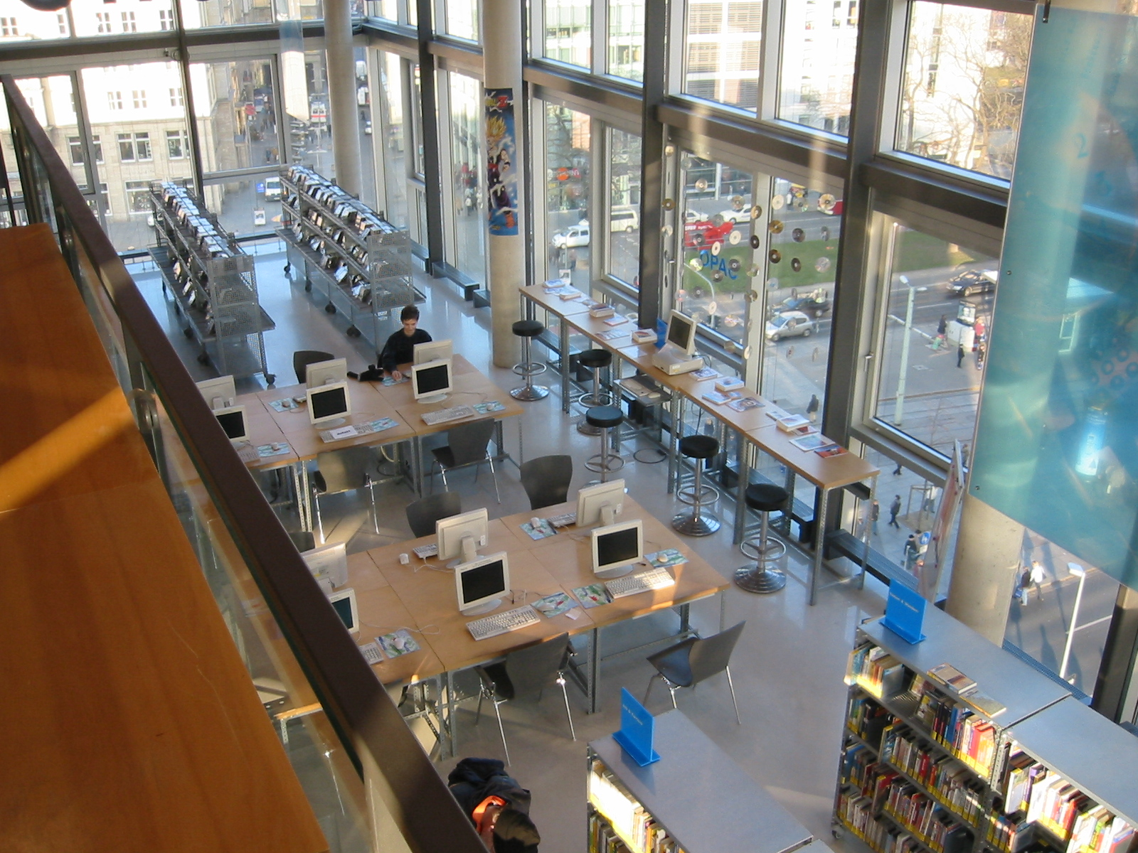 Rechnerpool medien@ge Außenstelle Städtische Bibliothek Dresden